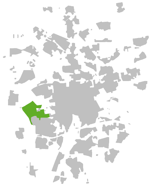 Lage des Westparks in Braunschweig.